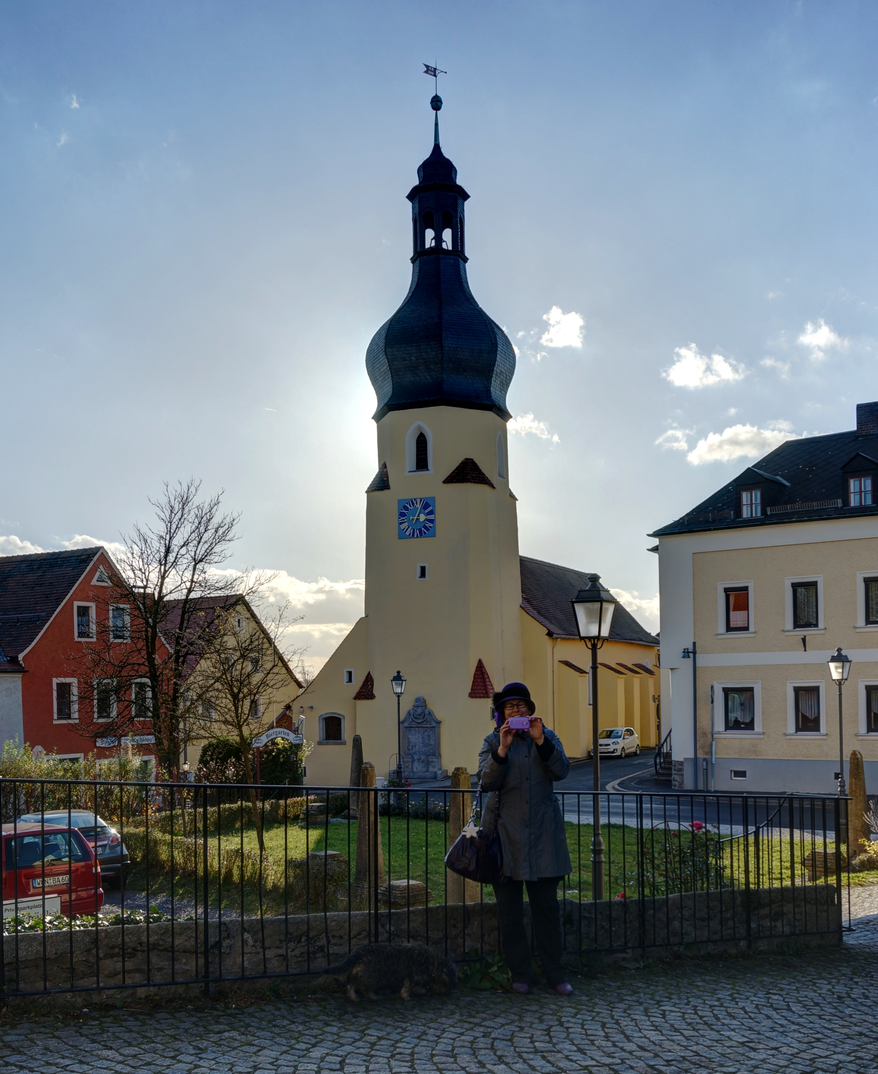 Deutschland, Bayern, Oberfranken, Landkreis Wunsiedel, Verwaltungsgemeinschaft Schirnding, Gemeinde Hohenberg, evangelische St. Elisabeth Kirche